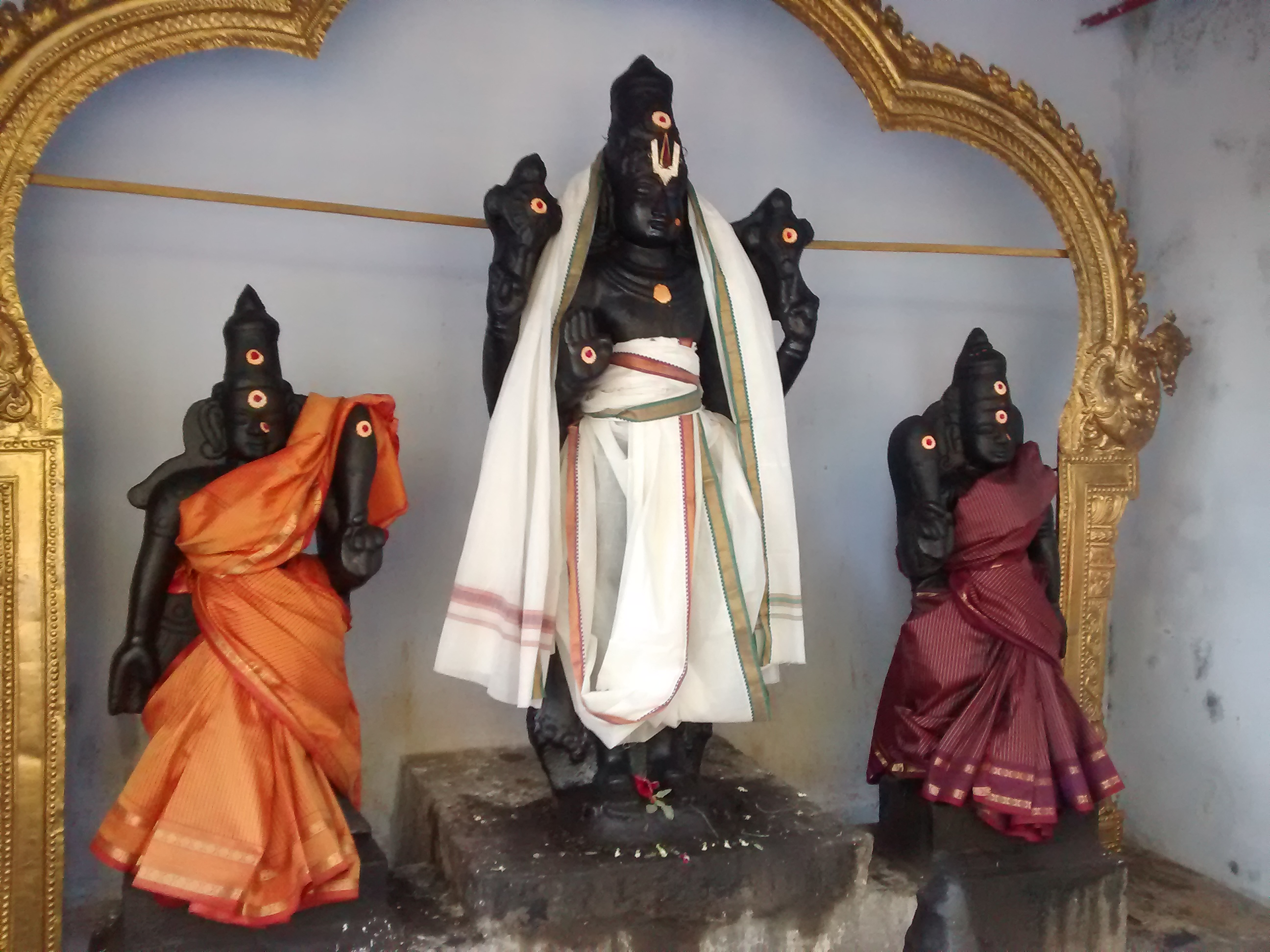 பேட்டவாய்த்தலை மத்யார்ஜுனேஸ்வரர் கோயில் சிற்பம்